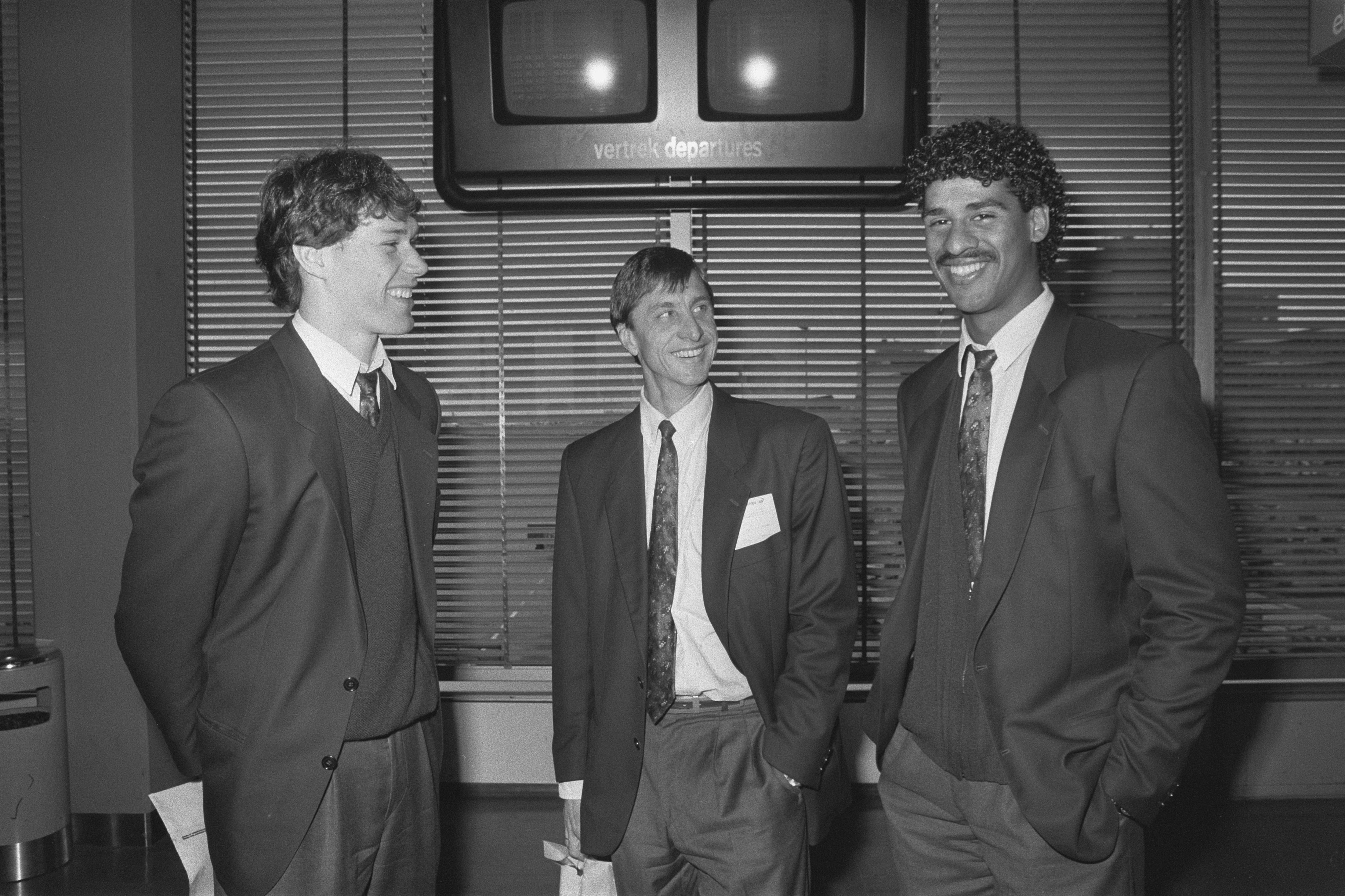 Collectie / Archief : Fotocollectie Anefo Reportage / Serie : [ onbekend ] Beschrijving : Vertrek Ajax van Schiphol voor Europa Cup II wedstrijd tegen Olympiakos Piraeus; vlnr: van Basten , Cruijff en Rijkaard Datum : 3 november 1986 Locatie : Noord-Holland, Schiphol Trefwoorden : spelers, sport, trainers, vliegvelden, voetbal Persoonsnaam : Basen Marco van, Cruijff, Johan, Rijkaard, Frank Instellingsnaam : Europa Cup, Olympiakos Piraeus Fotograaf : Molendijk, Bart / Anefo Auteursrechthebbende : Nationaal Archief Materiaalsoort : Negatief (zwart/wit) Nummer archiefinventaris : bekijk toegang 2.24.01.05 Bestanddeelnummer : 933-8034